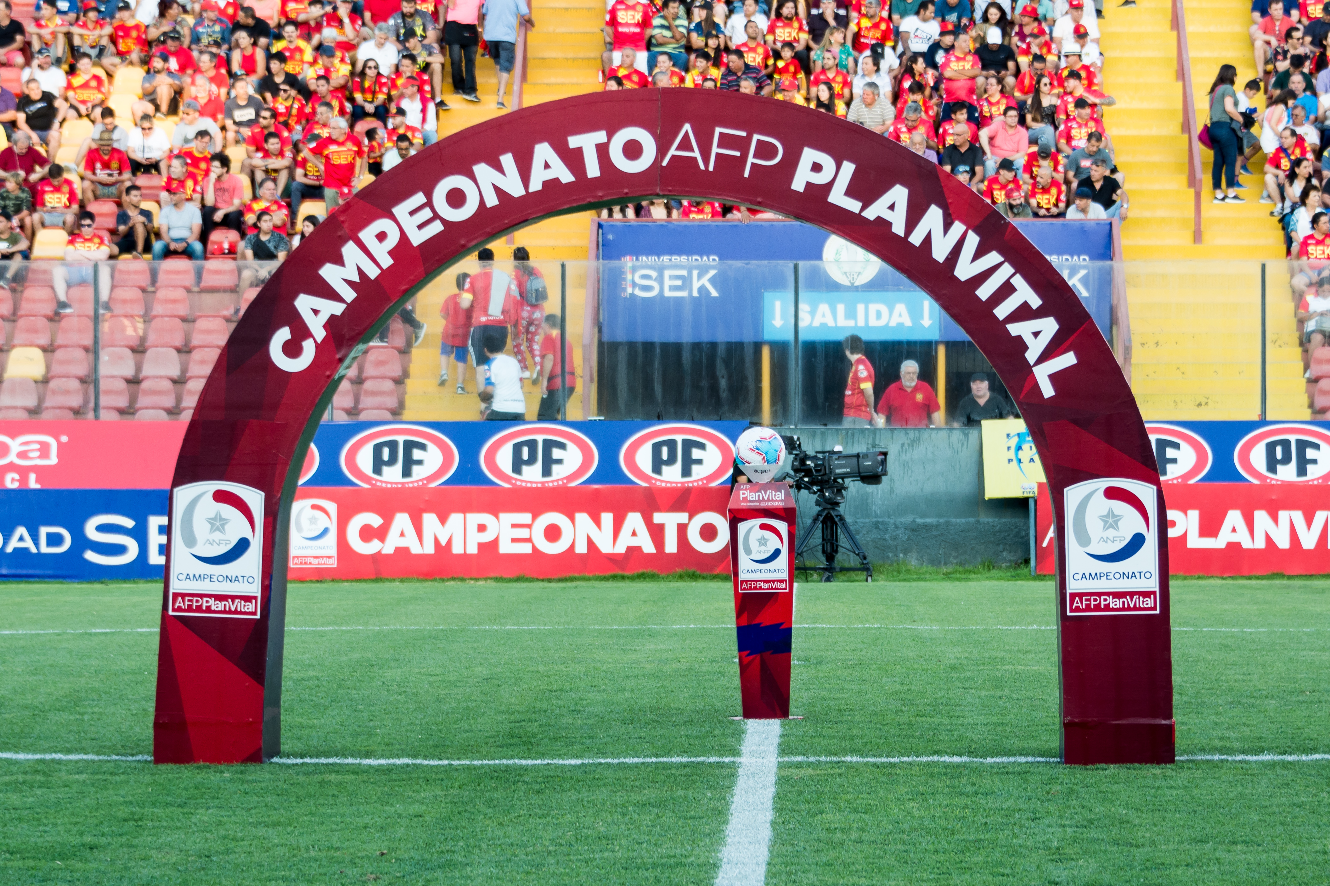 Unión Española v Deportes Iquique, Estadio Santa Laura, Independencia, Santiago, Región Metropolitana, Chile